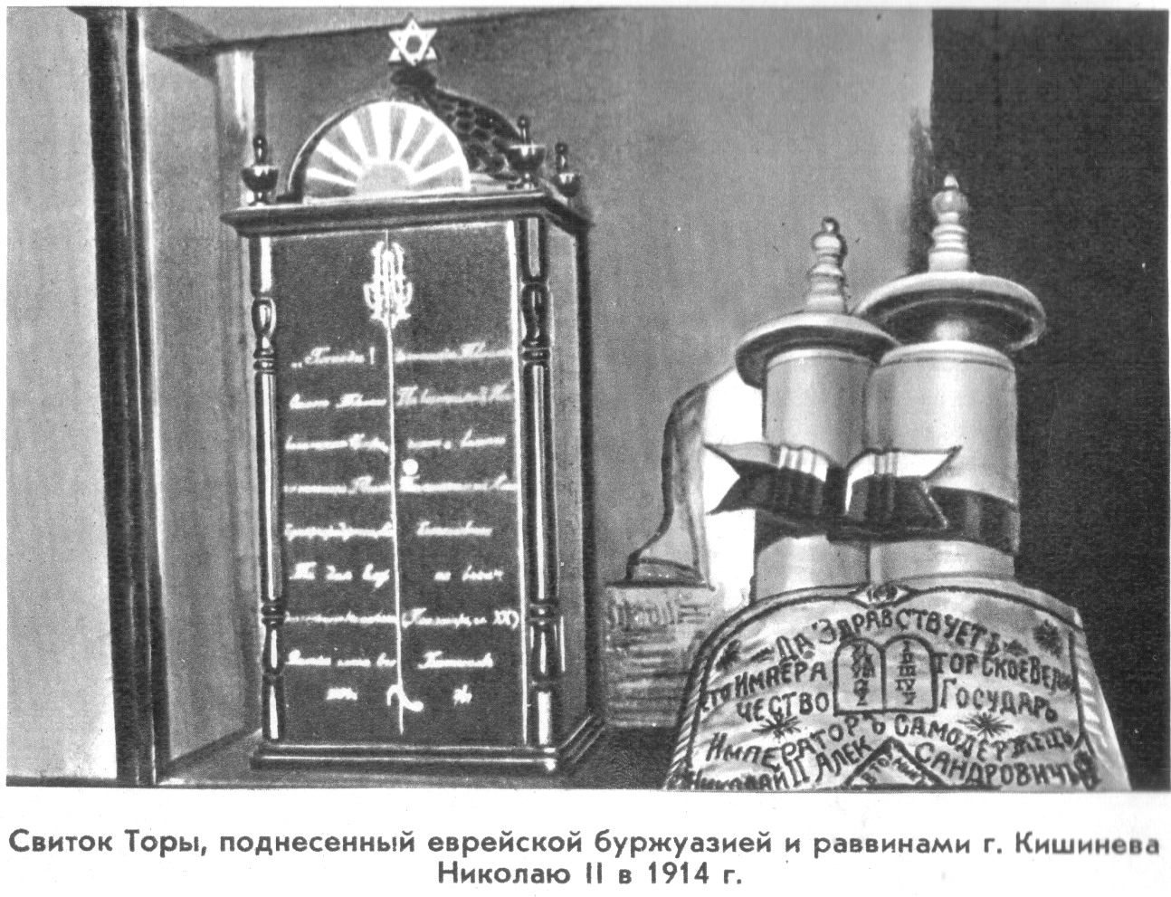 Torah scrolls presented by Jewish community of Kishinev to Nicholas II in 1914. Свиток Торы, поднесённый еврейской буржуазией и раввинами г. Кишинева Николаю II в 1914.